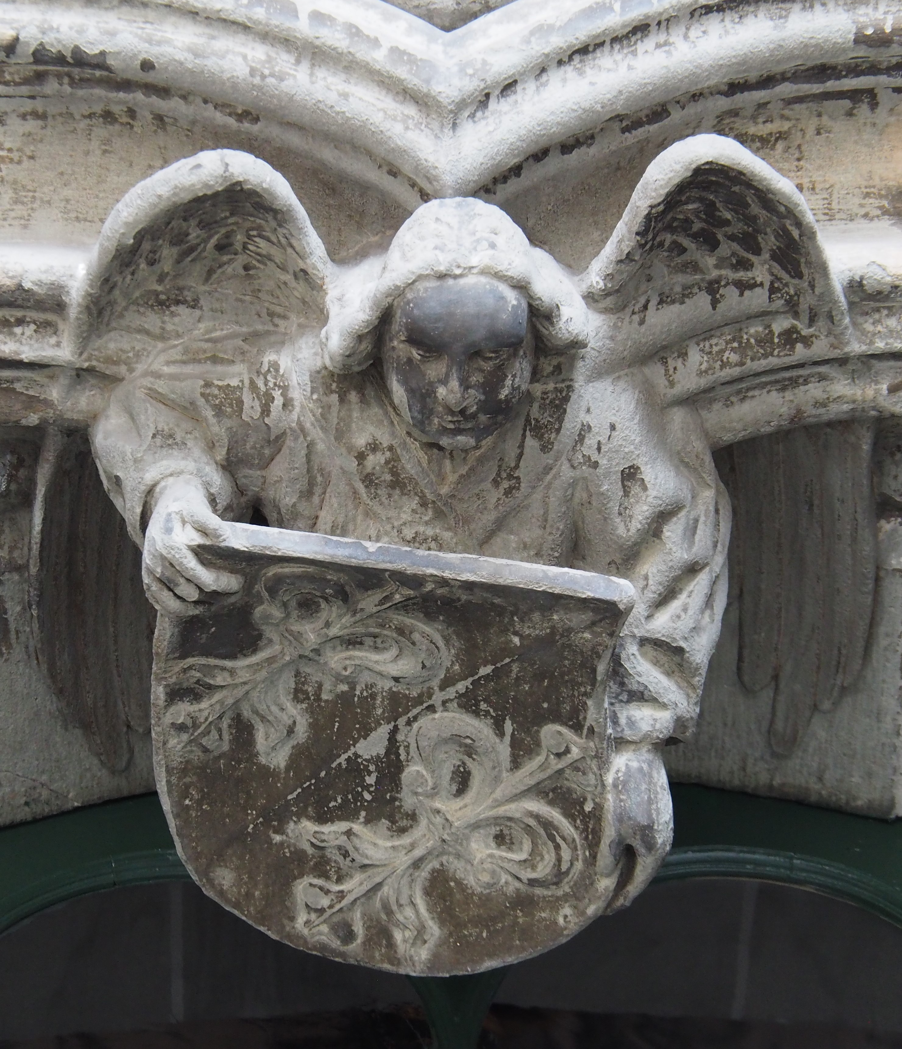 Berner Münster, südliches Westportal, Wappen Hofemeister